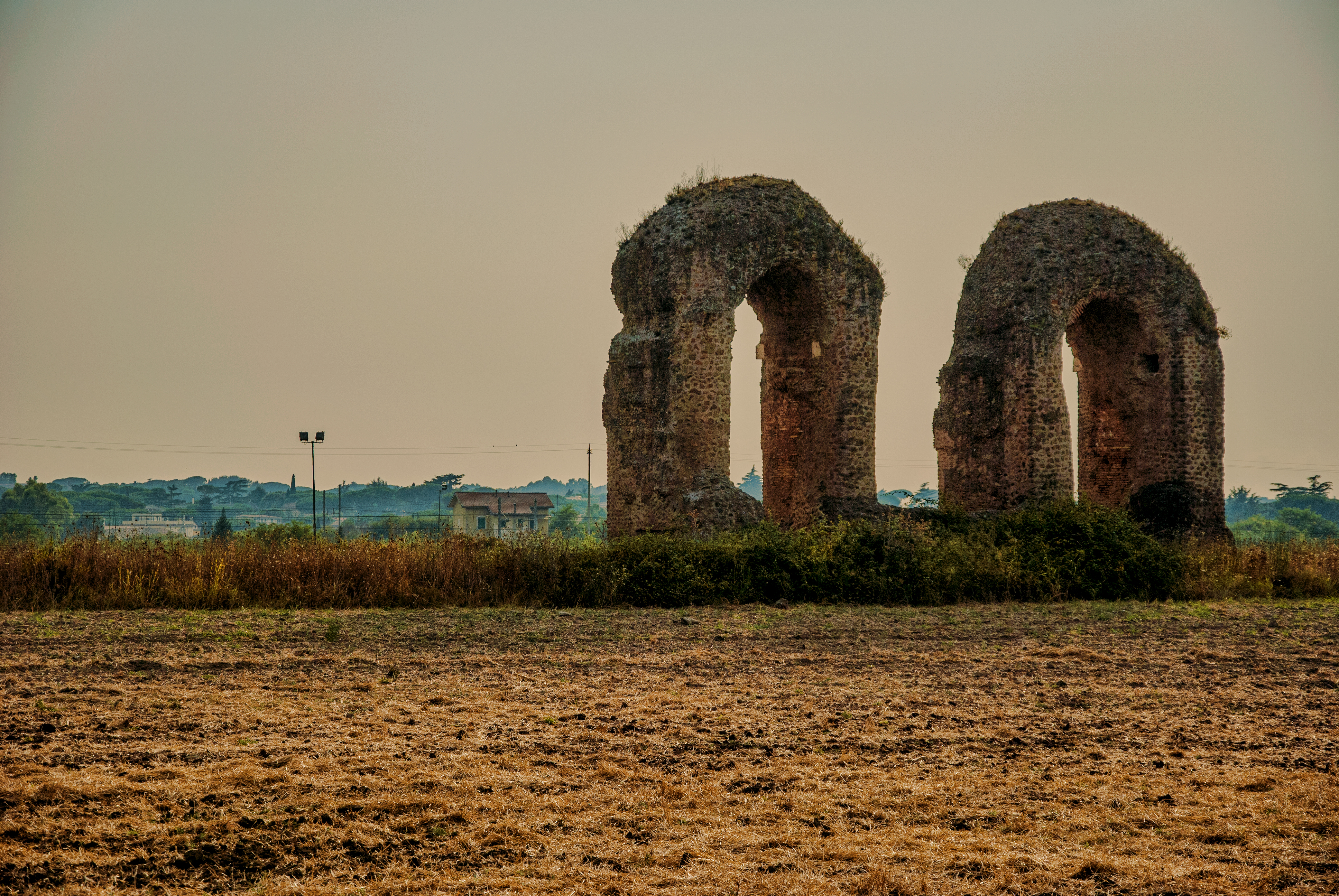 parco degli Acquedotti This is a photo of a monument which is part of cultural heritage of Italy.